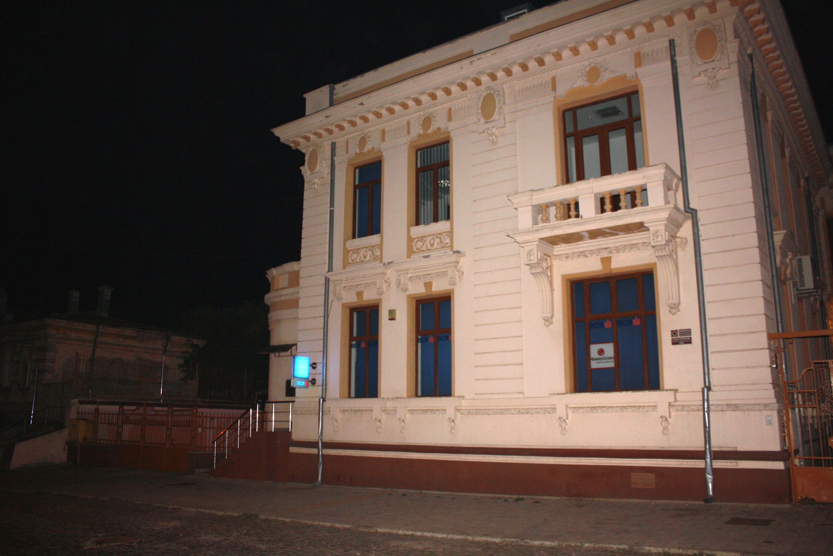 Clubul NAVROM, azi BCR - filiala Brăila - Str. Danubiului 12